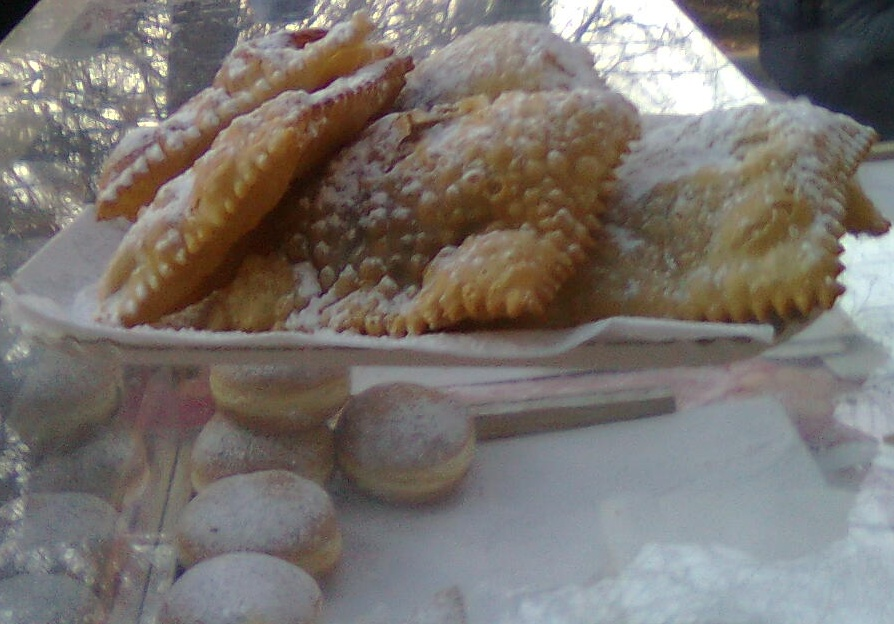 Kirchtagskrapfen, darunter Faschingskrapfen (aka Berliner Pfannkuchen)